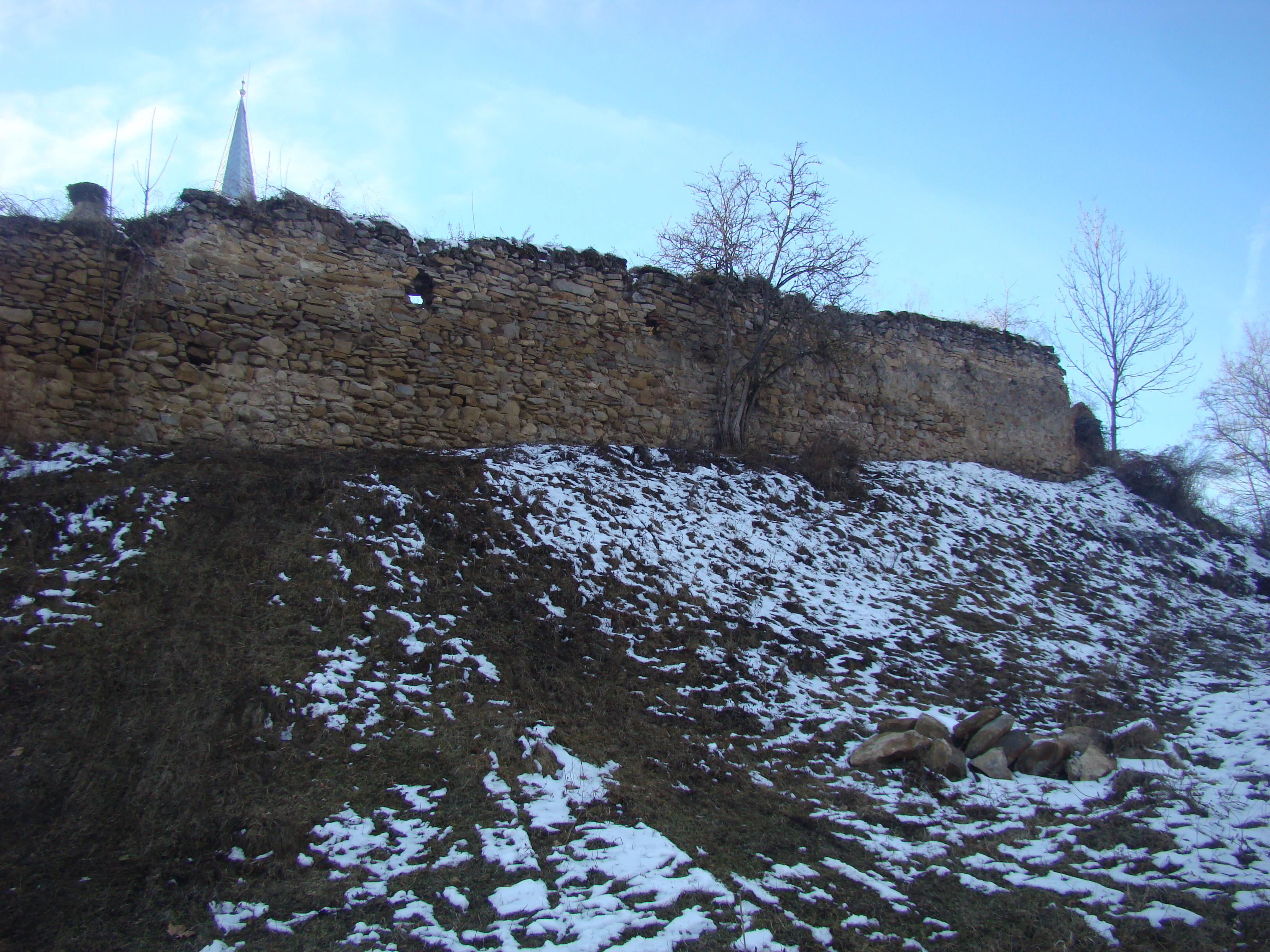 Biserica evanghelică fortificată din Alțâna, județul Sibiu 02